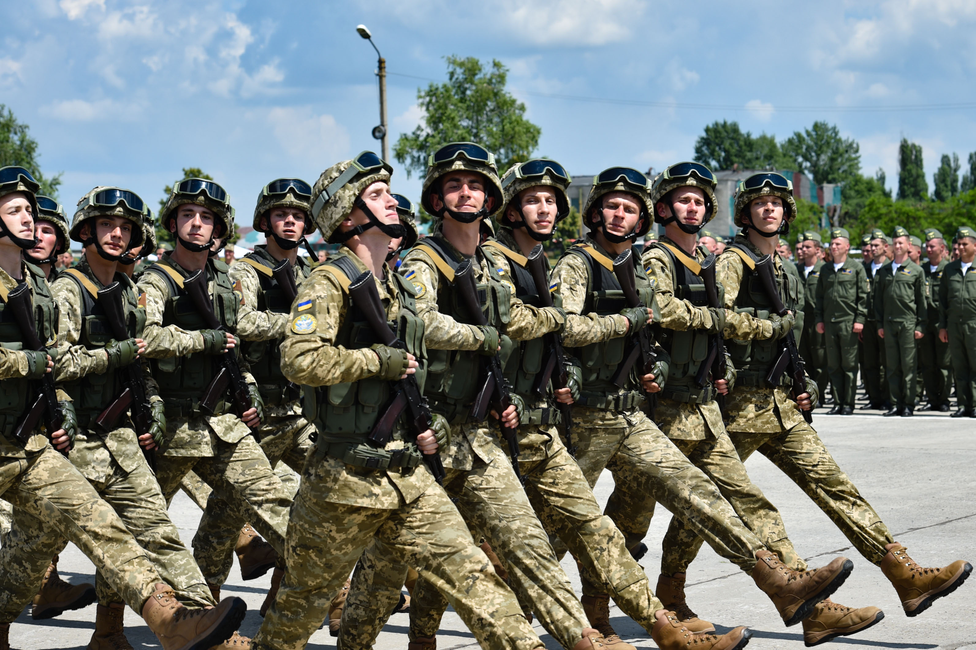 В рамках відвідин університету, Главі держави були продемонстровані польоти бойової авіаційної техніки та зразки техніки. В урочистому заході також взяли участь Міністр оборони України генерал армії України Степан Полторак, начальник Генерального штабу ЗС України генерал армії України Віктор Муженко, посадові особи оборонного відомства та Збройних Сил України. Президент Петро Порошенко присвоїв Харківському університету Повітряних Сил імені Івана Кожедуба статус національного. Глава держави підписав відповідний Указ. Під час участі в урочистій церемонії вручення дипломів випускникам університету Президент наголосив на вагомих результатах діяльності викладацького колективу закладу та високо оцінив внесок у підготовку фахівців для Повітряних Сил України, подвиги випускників навчального закладу. "У загальній системі підготовки та виховання майбутнього офіцера вдалося гармонічно поєднати багаторічні традиції університету, сучасні новаторські підходи до навчання офіцерів-льотчиків та потужну навчально-матеріальну базу",- сказав Петро Порошенко. Президент зазначив, що Харківський університет протягом багатьох років випускав добре підготовлені та освічені кадри, які з честю виконують свій конституційний обов’язок та дотримуються присяги. Глава держави нагадав, що більше 200 військових Повітряних Сил відзначені державними нагородами за особисту мужність та героїзм. На жаль, 28 випускників університету загинули в зоні АТО. Присутні вшанували пам'ять загиблих. Глава держави привітав Університет з черговим випуском офіцерів-льотчиків, побажавши нових звершень в справі підготовки військових кадрів для українського війська. Петро Порошенко вручив дипломи з відзнакою та золоті медалі найкращим випускникам. Президент також вручив бойовий прапор Харківському національному університету Повітряних Сил імені Івана Кожедуба.